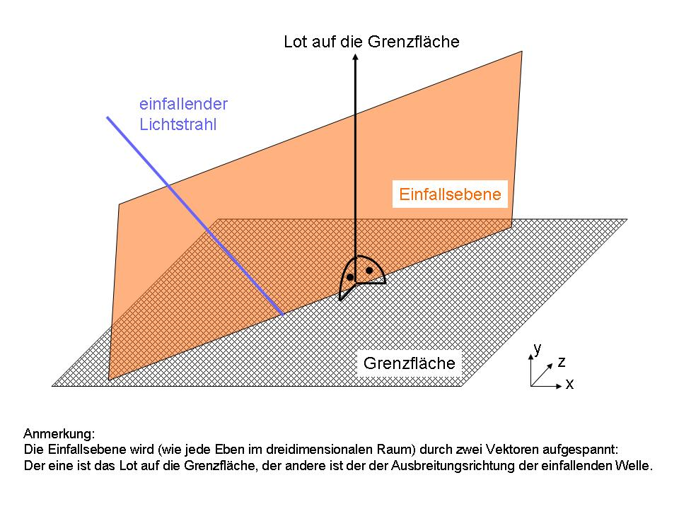 Veranschaulichung des Begriffs "Einfallsebene"